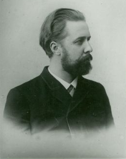 Gustav Tammann